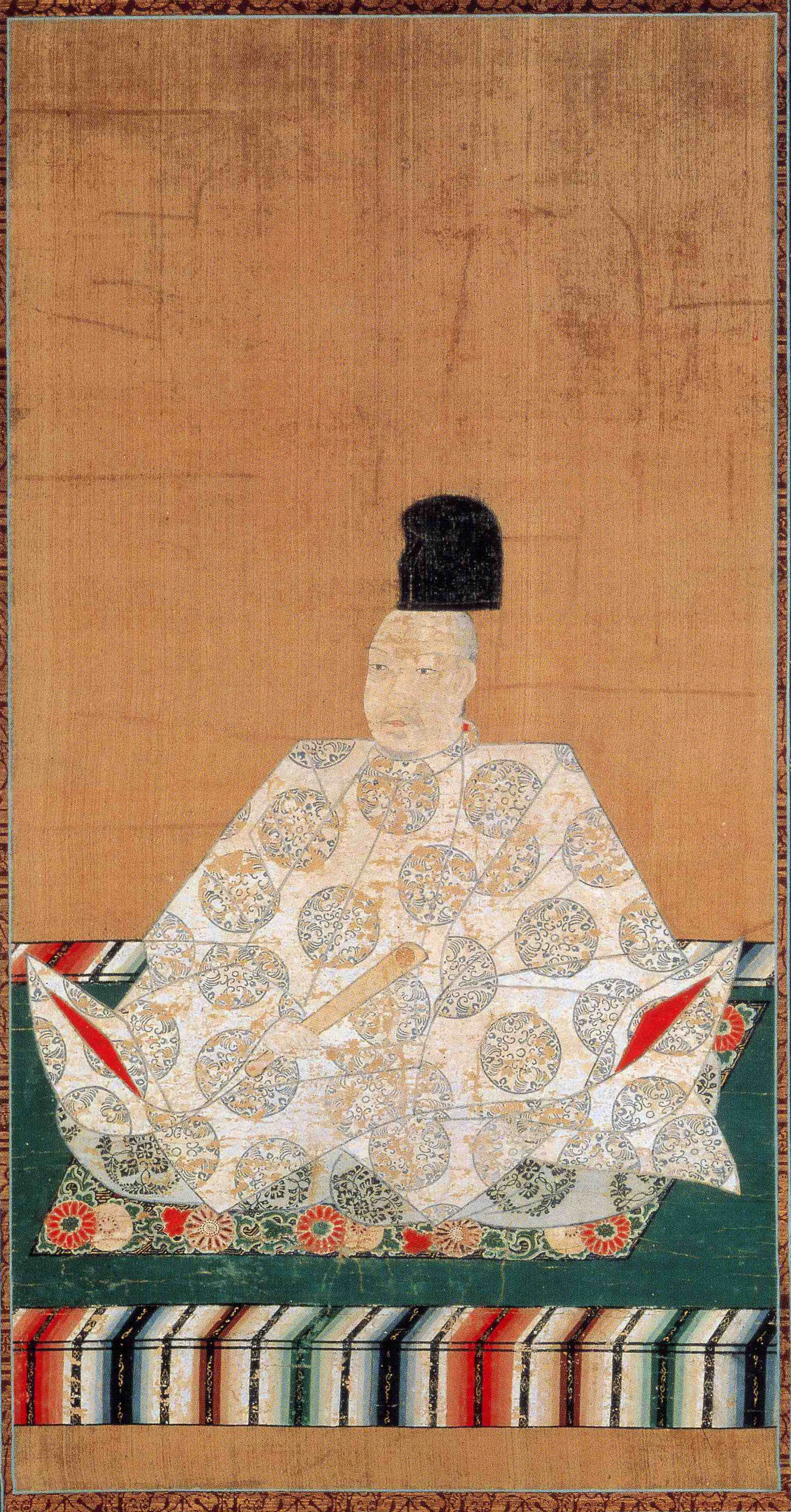 正親町天皇尊影